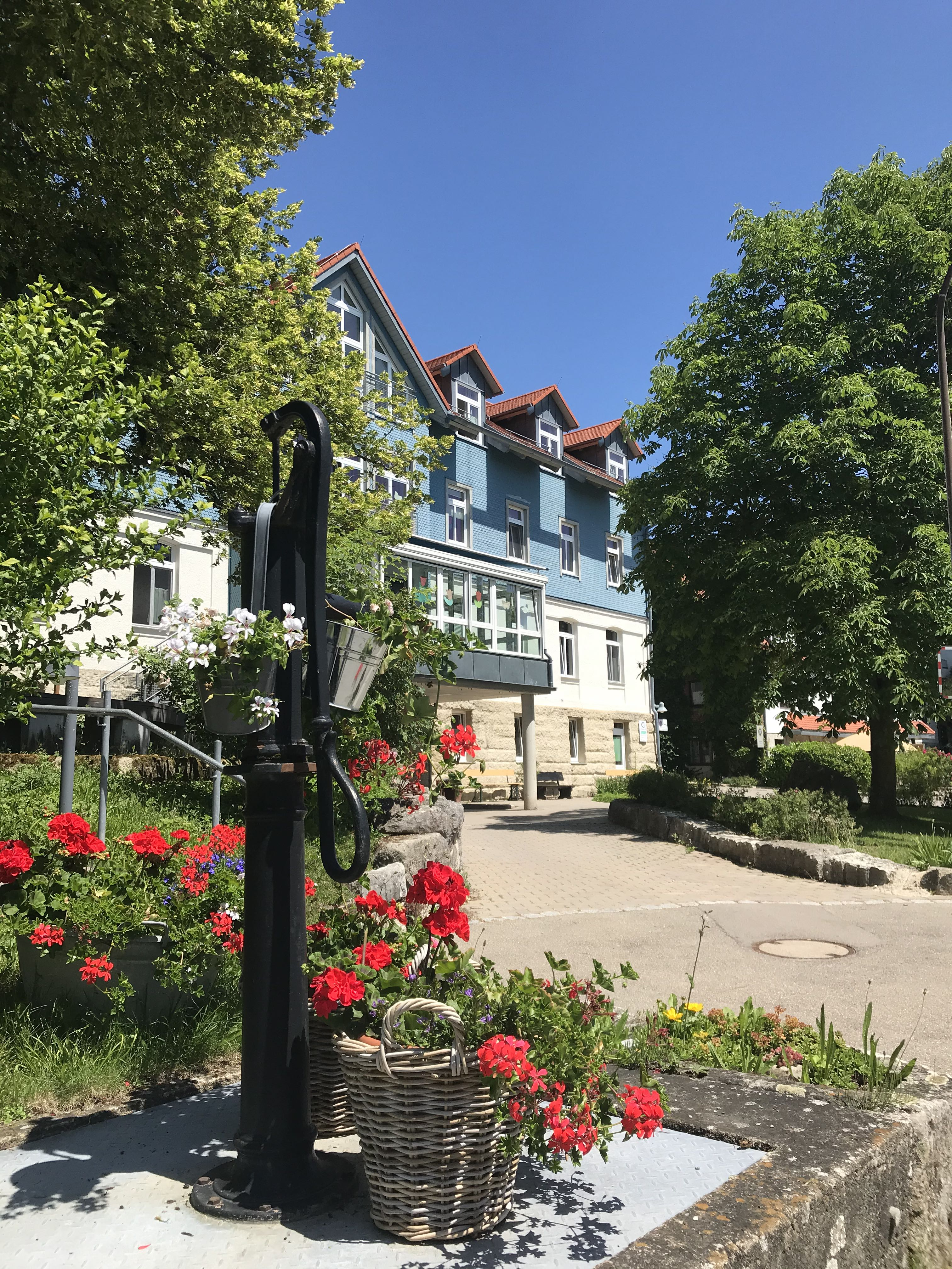 Der Hauptsitz der Erlacher Höhe im August 2020. (Bild: Erlacher Höhe)